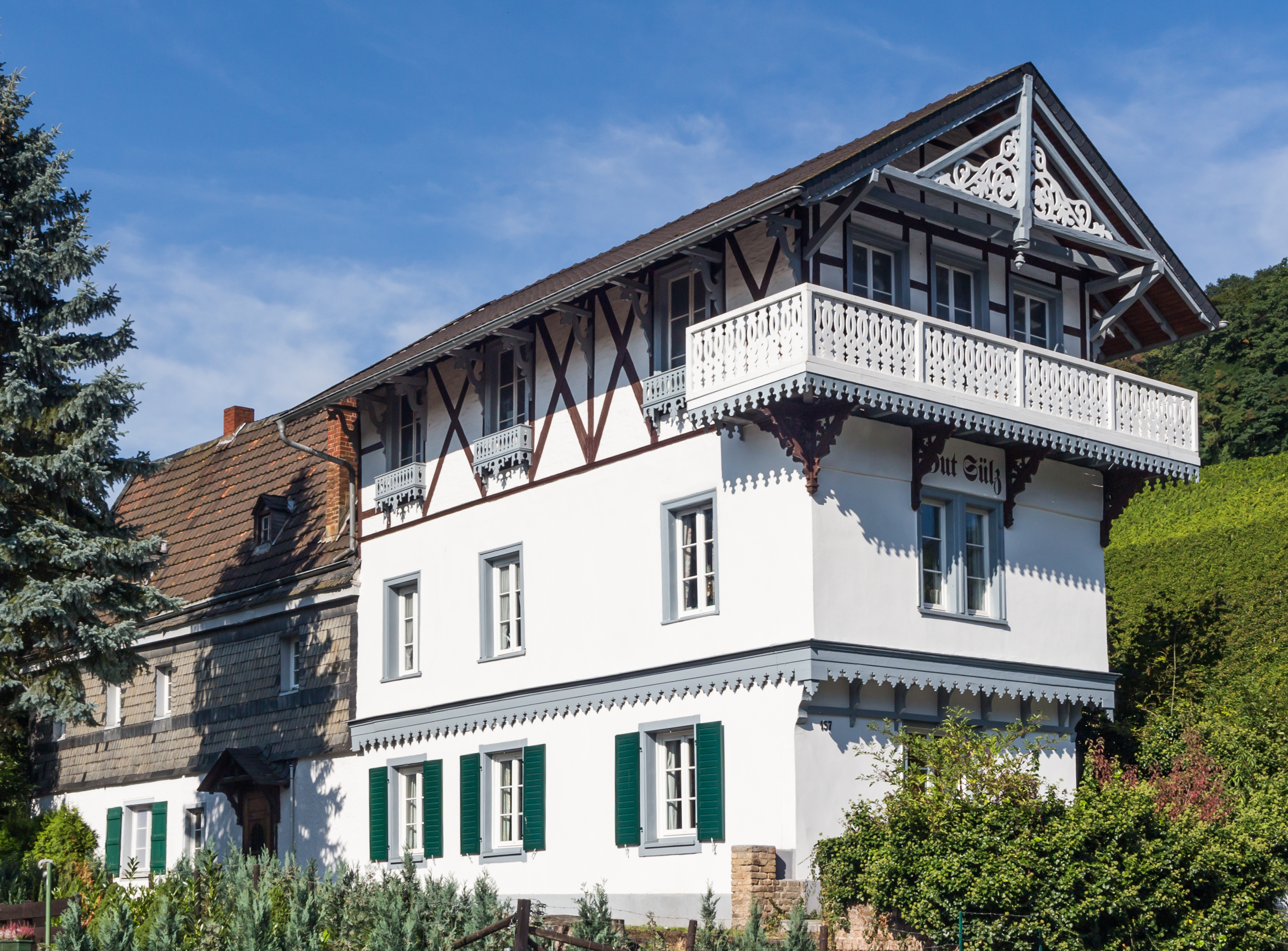 Gut Sülz, Bachstraße 157, Königswinter-Oberdollendorf This is a photograph of an architectural monument. 153